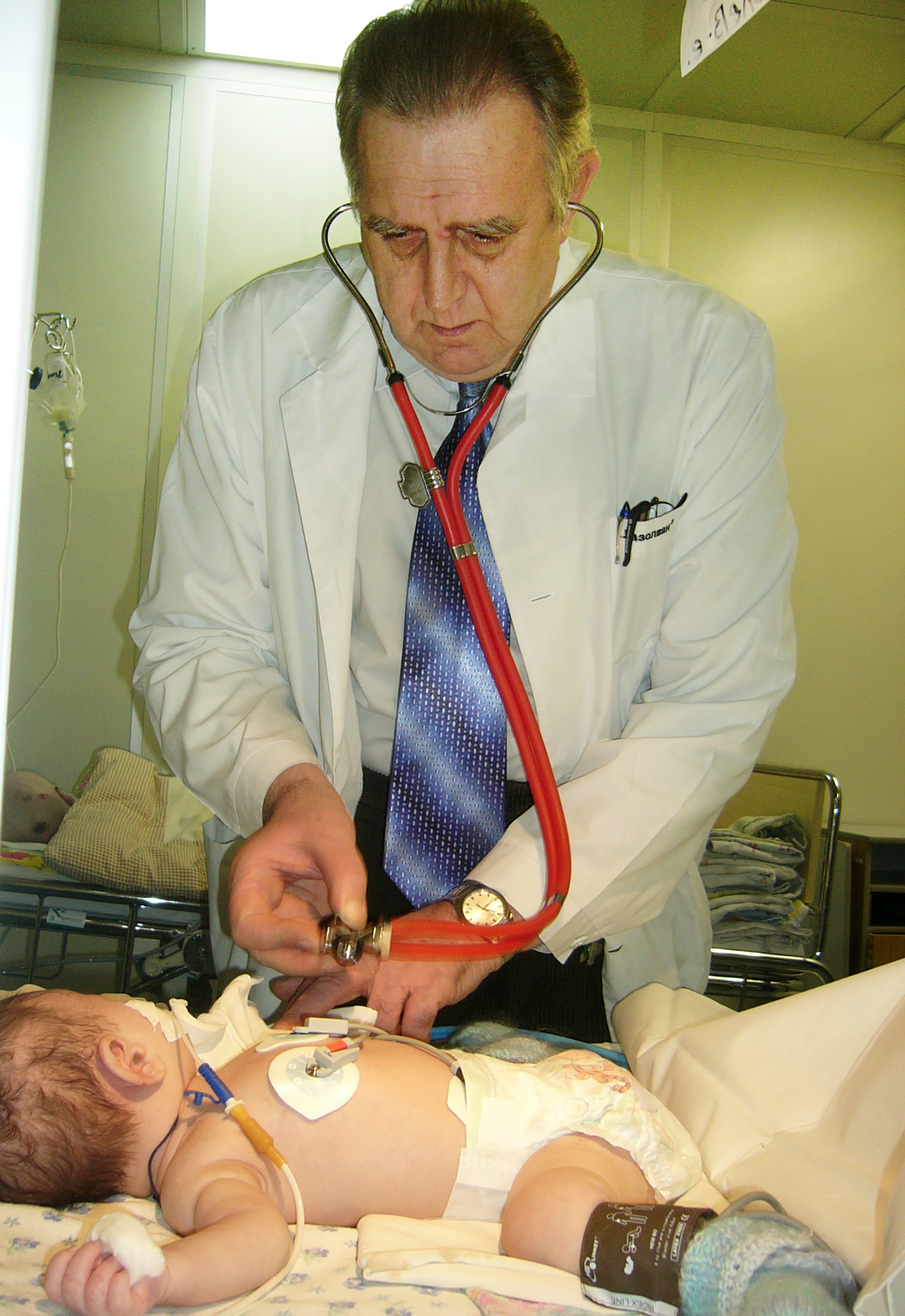 Повседневная работа начмеда ДГБ № 1 Санкт-Петербурга Павел Борисович Коренева